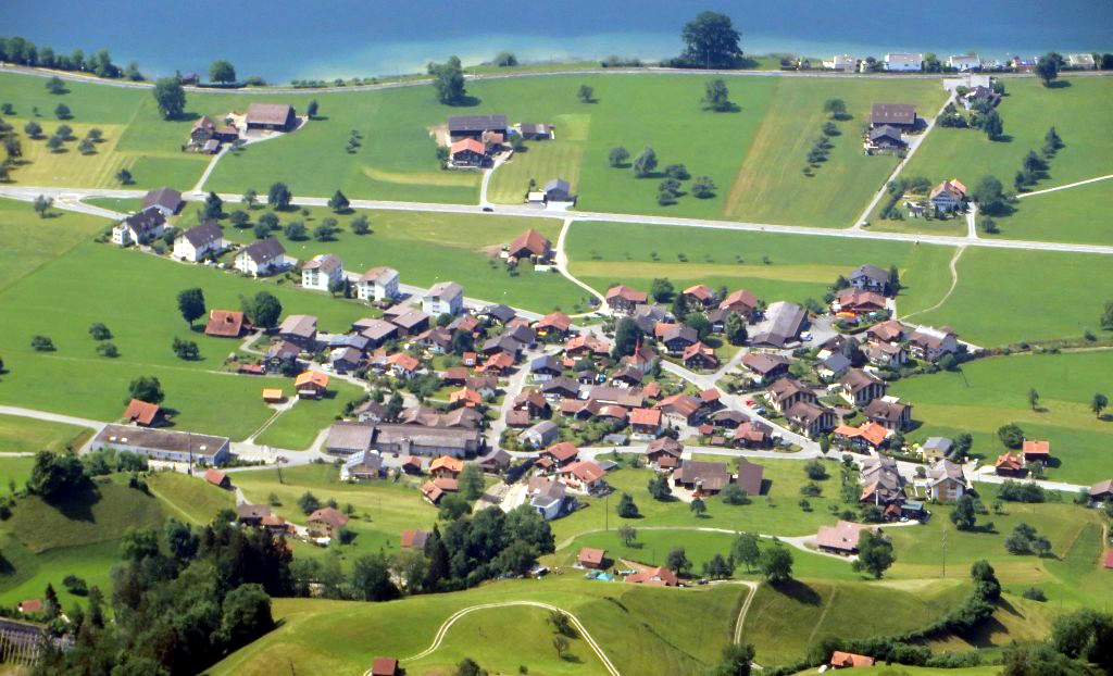 Ort Edisried im Kanton Obwalden, Schweiz.